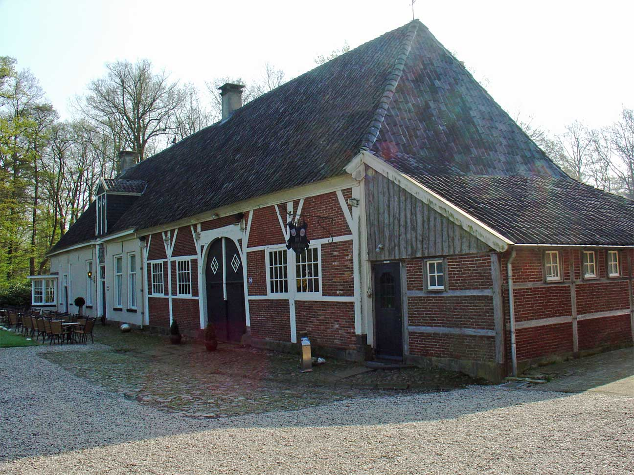 Havezate Het Everloo in Volthe nabij Rossum